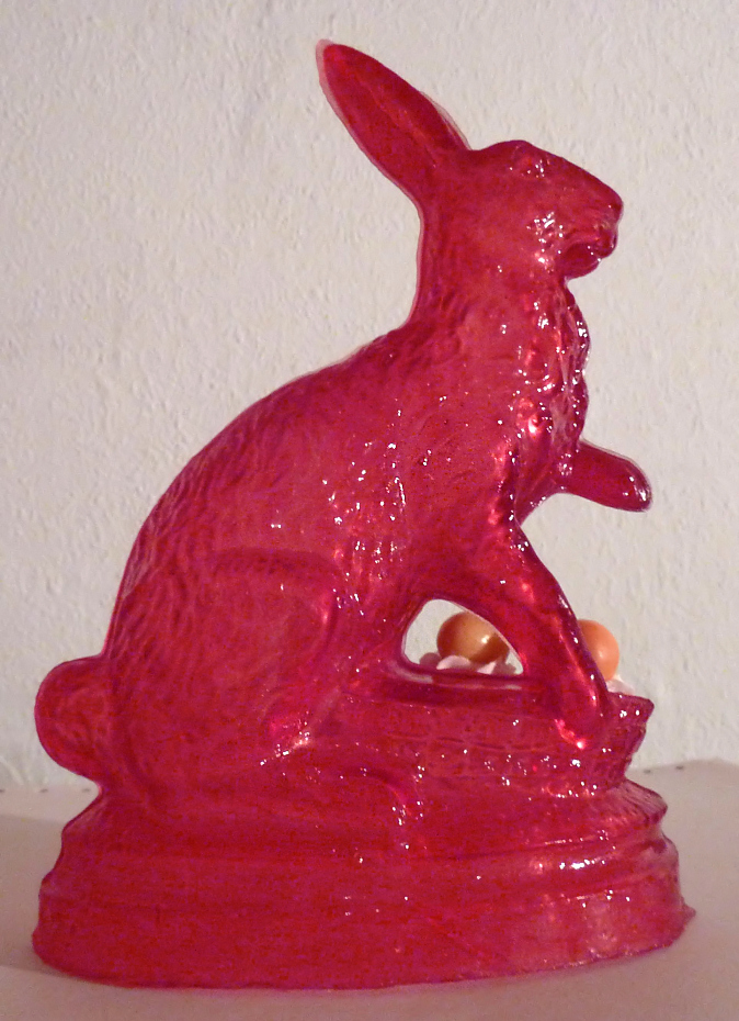 Zuckerhase